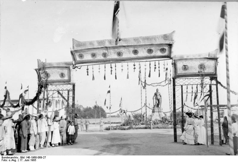 Die Enthüllungsfeier des Deutschen Kriegerdenkmals am 17ten Juni 1905 zu Tientsin Das Denkmal nach der Enthüllung